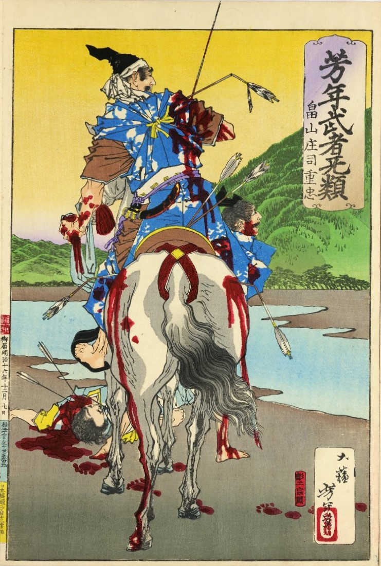 畠山庄司重忠 月岡芳年画「芳年武者无類」。畠山重忠（1164-1203）は愛甲季隆に射られて討ち死にしたと言われる